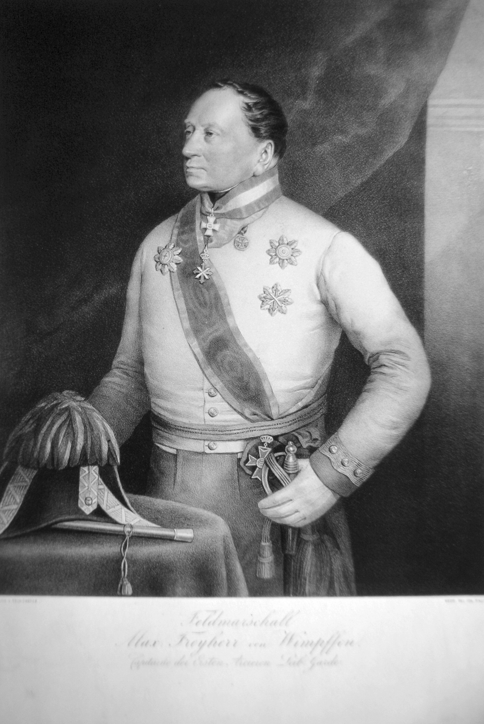 Maximilian Freiherr von Wimpffen als Kapitän der Arcièren-Leibgarde